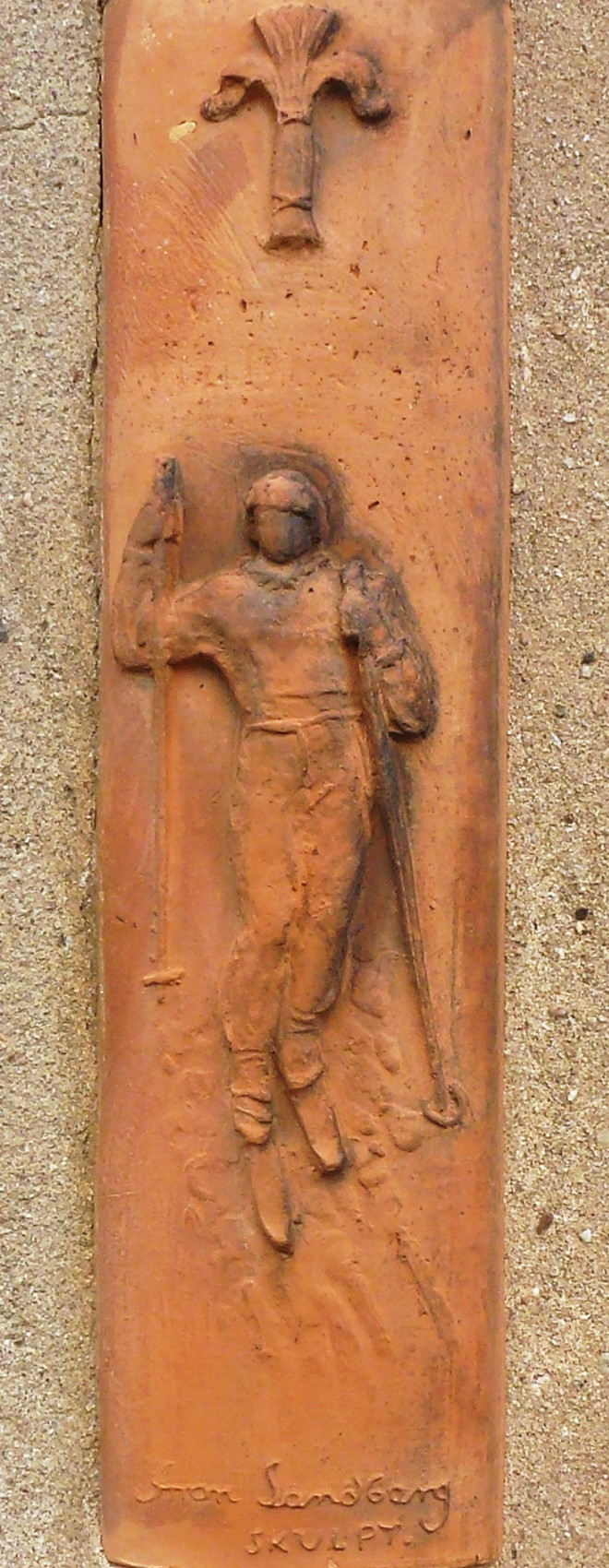 Ludvika stadshus tegelskulptur av Aron Sandberg